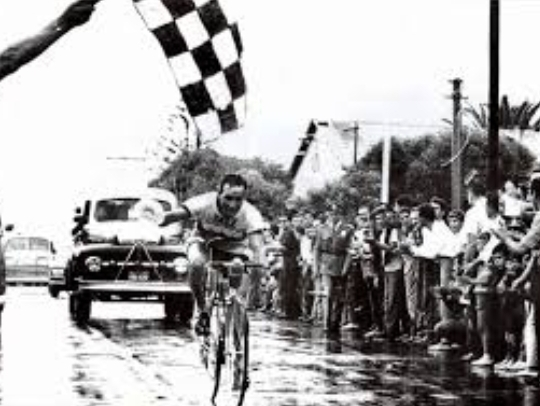 Llegada de las 1000 millas orientales Dardo Sanchez ganador 1961